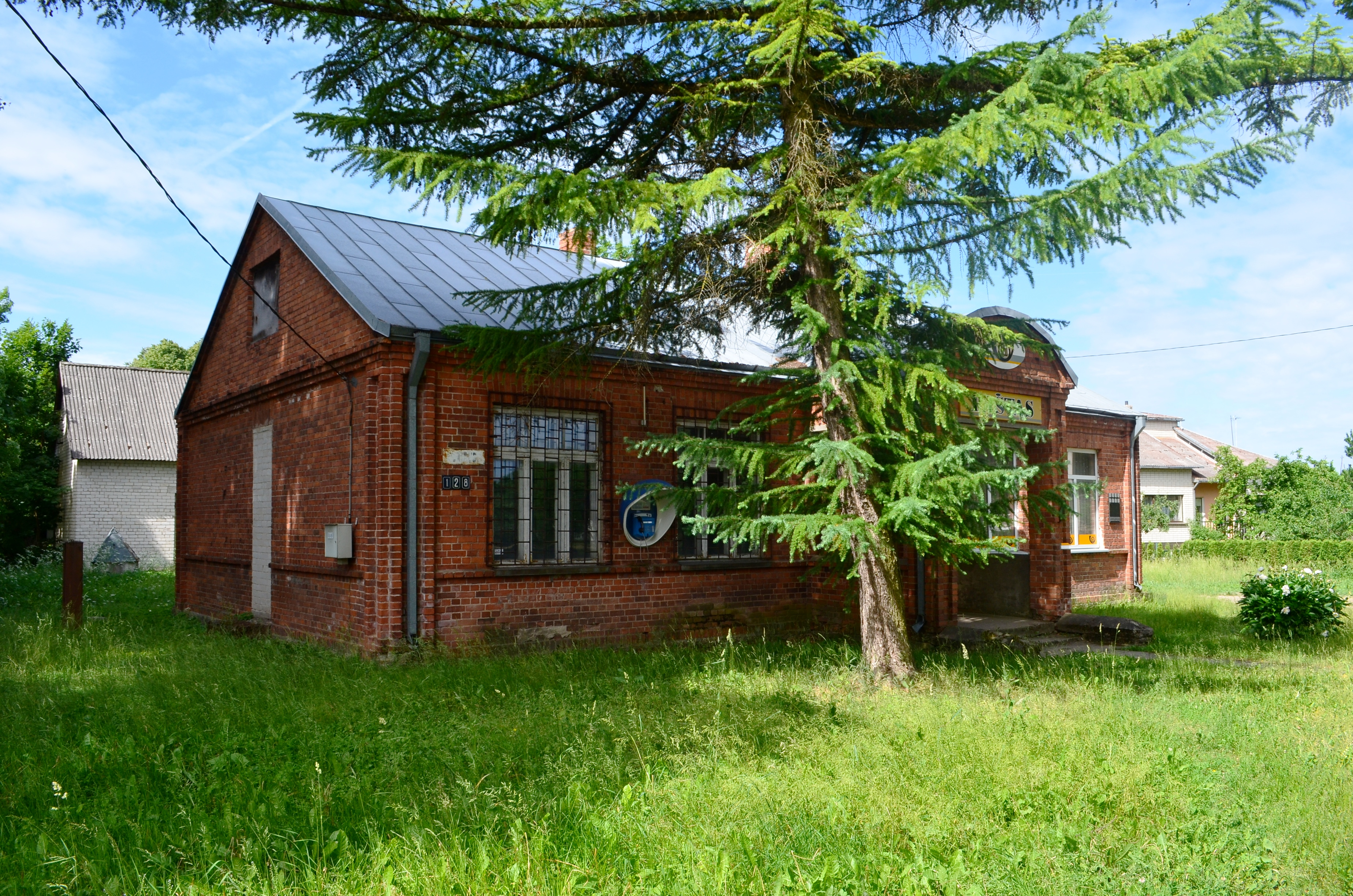 Balbieriškio paštas, Prienų raj.